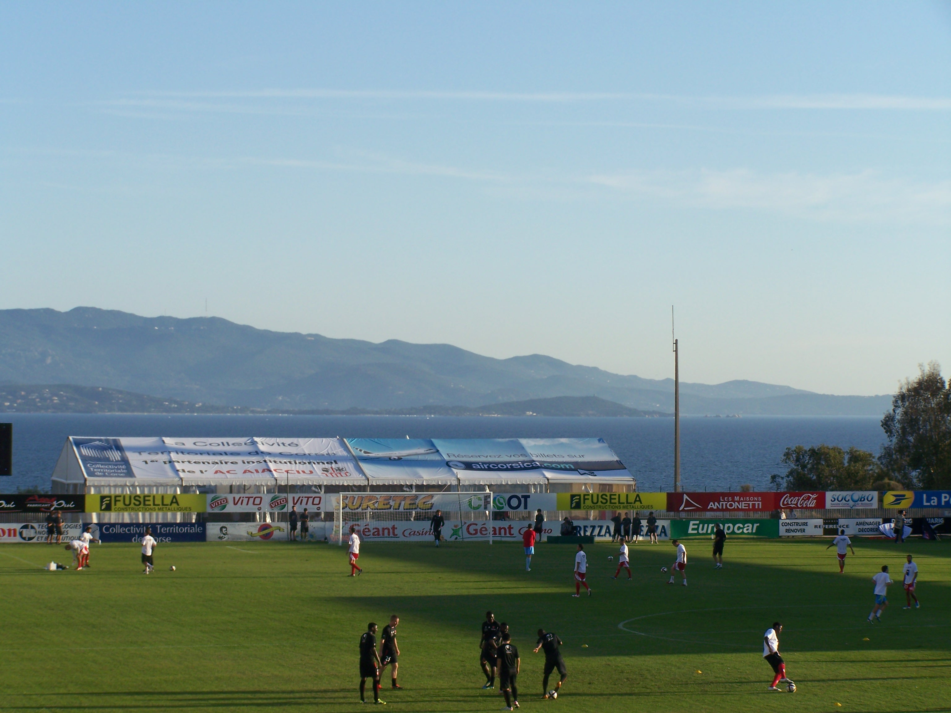 vue imprenable sur la Méditerranée